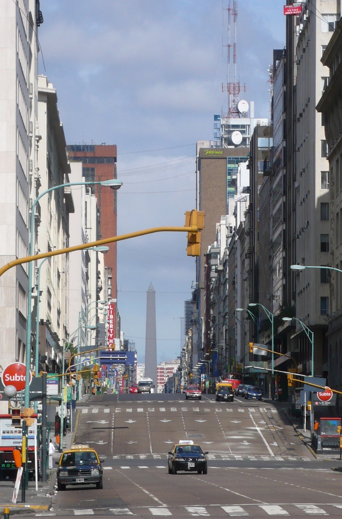 Corrientes Avenue, Buenos Aires.